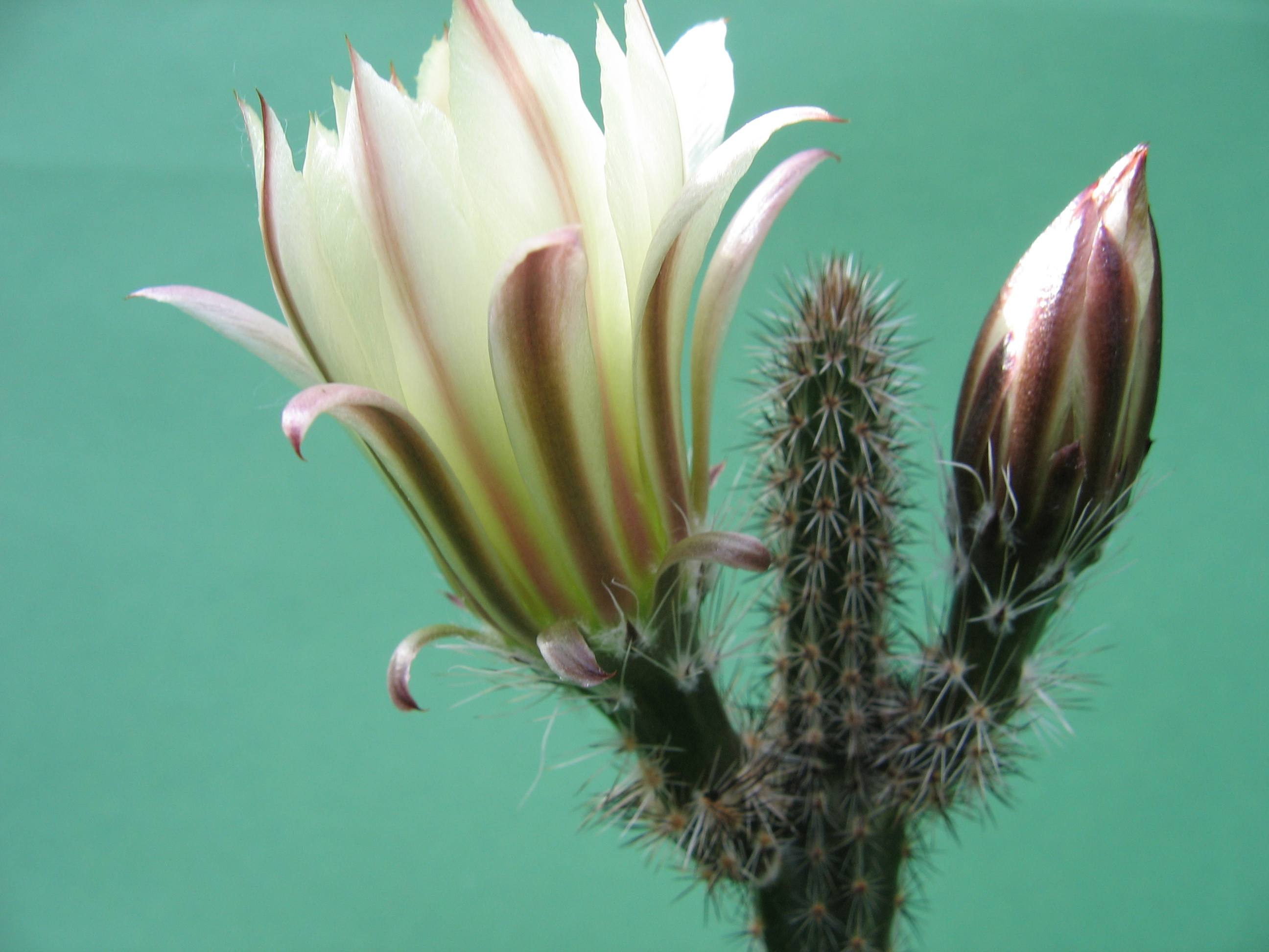 Knospe, Trieb und Perianth